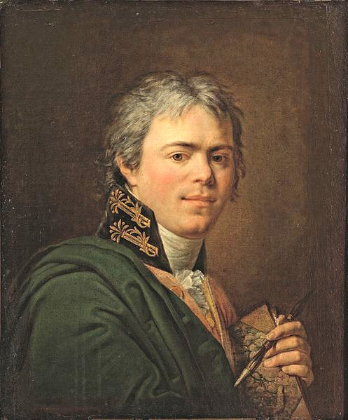 Self-portrait